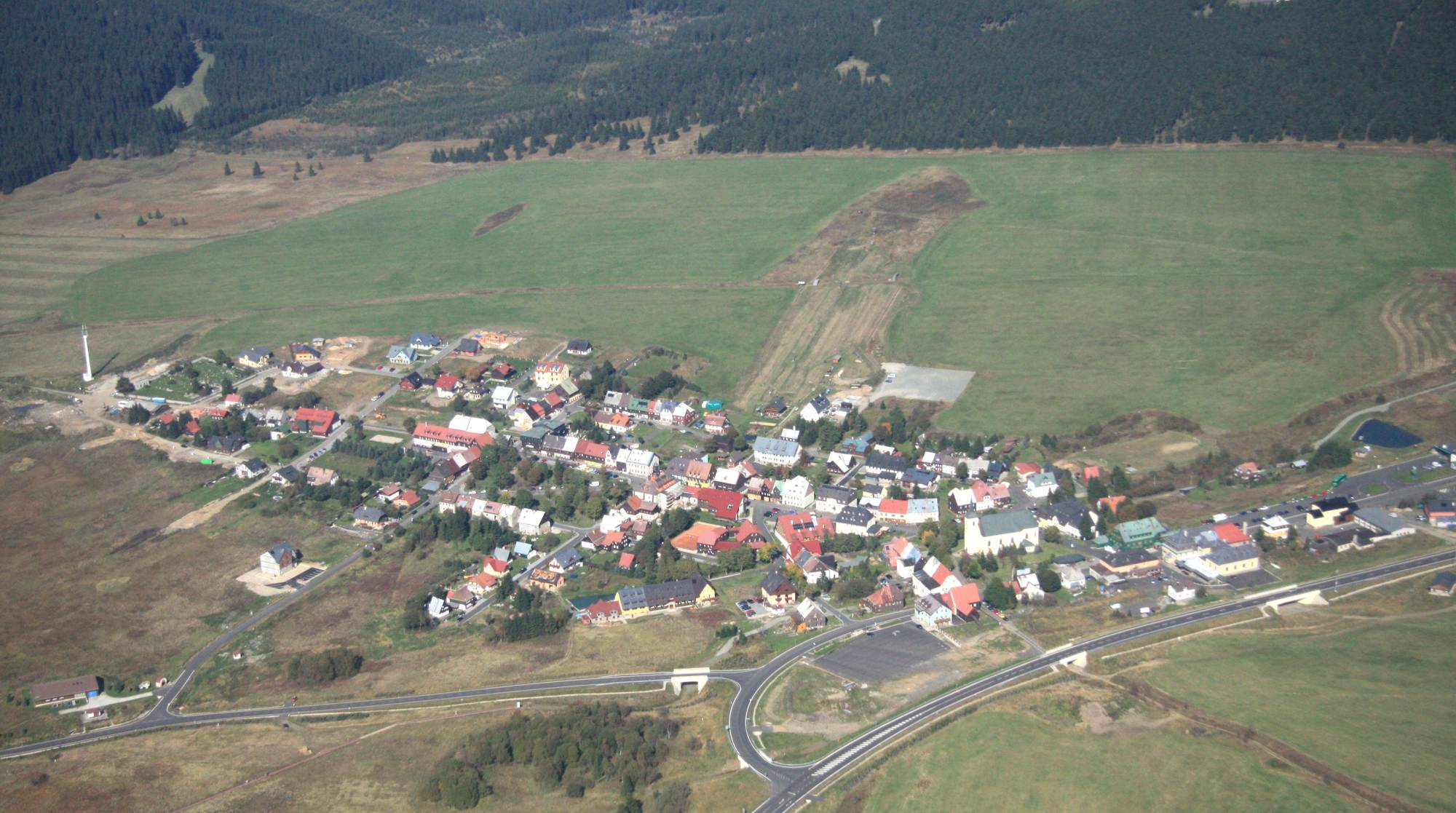 Boží dar letecky